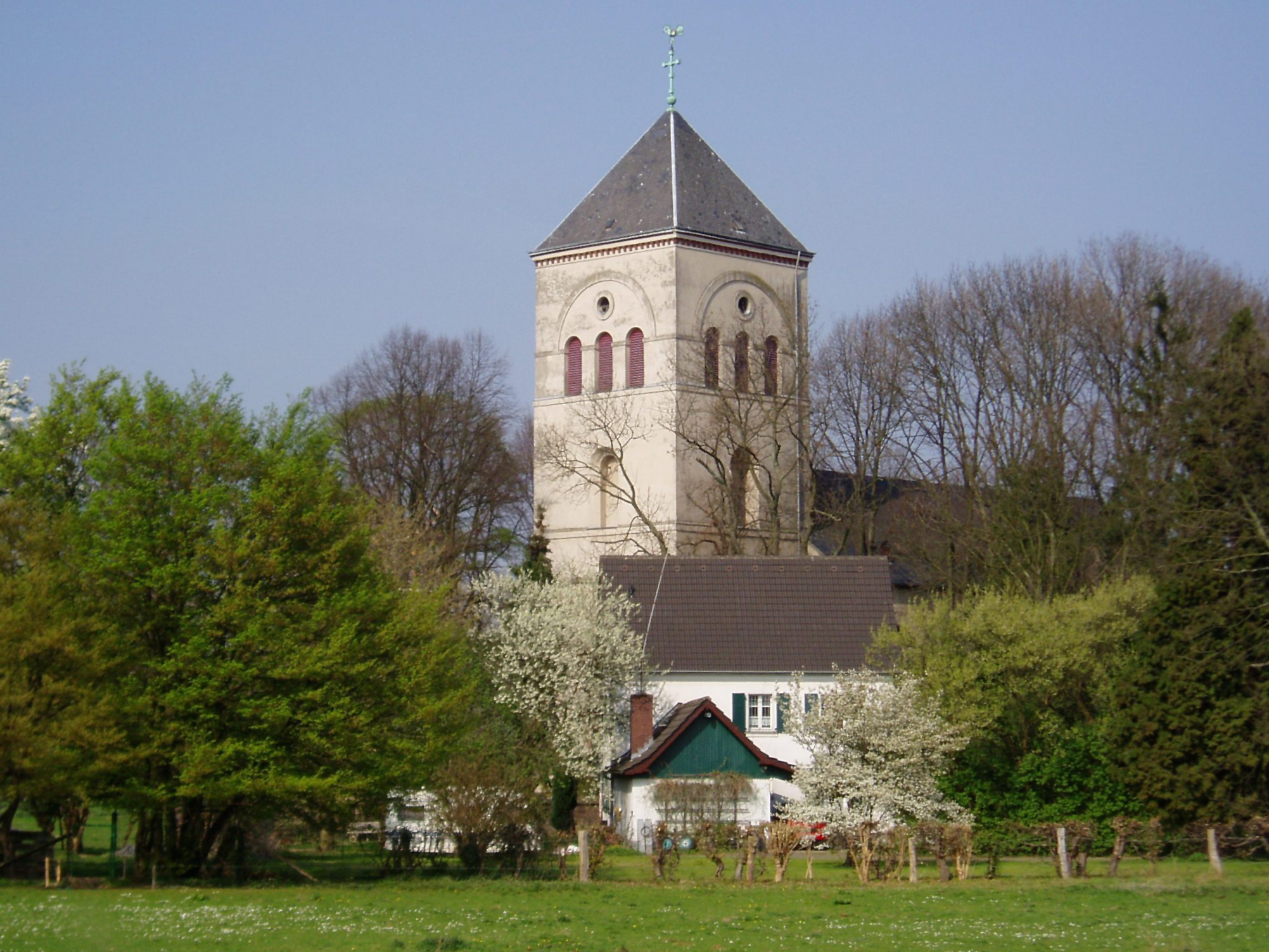 Köln-Merheim - St. Gereon